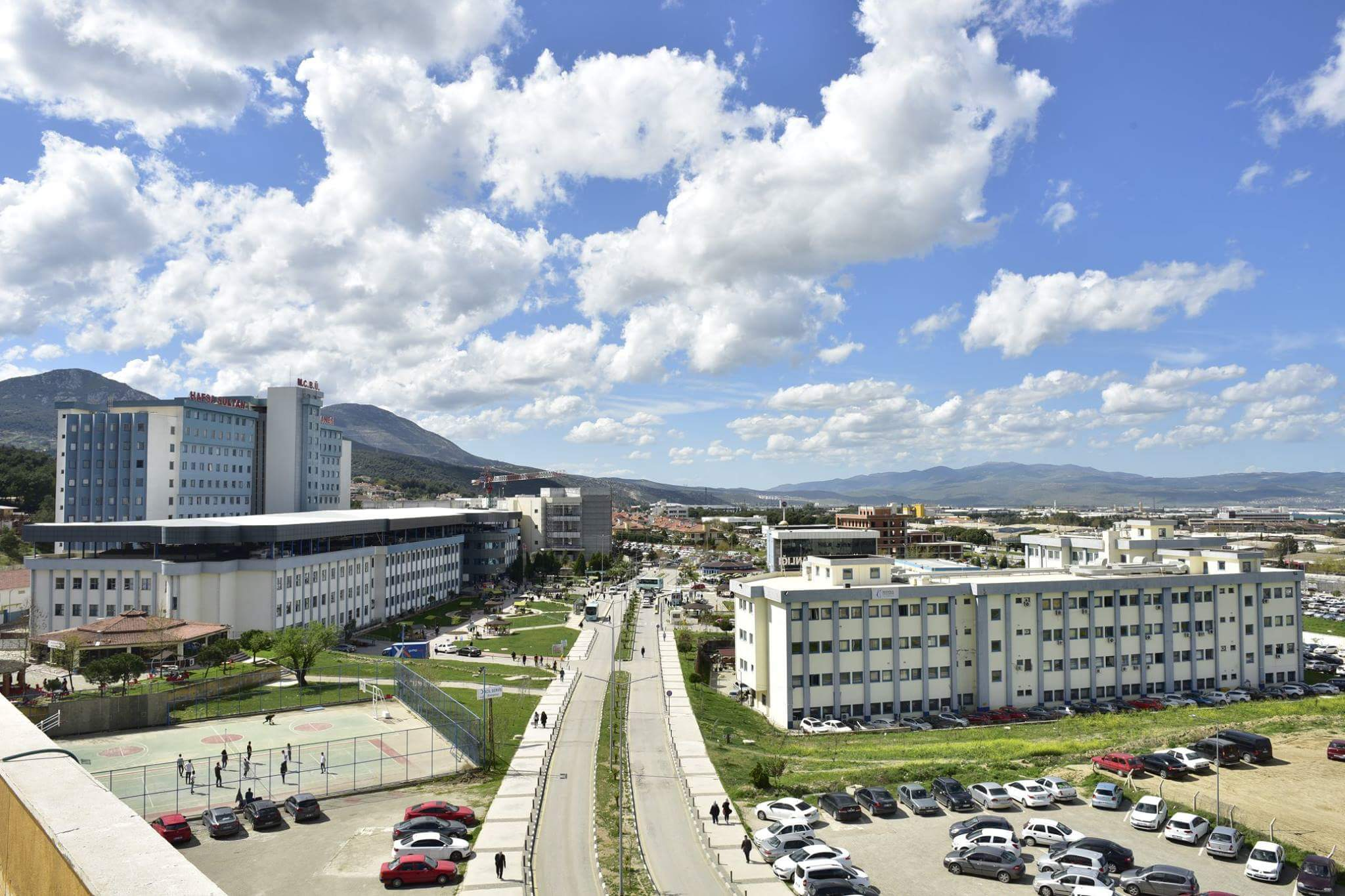 Celal Bayar Üniversitesi Tıp Fakültesi Hastanesi